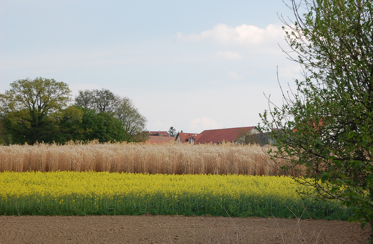 Energiepflanzenanbau bei Pulverdingen (Raps und Miscanthus)